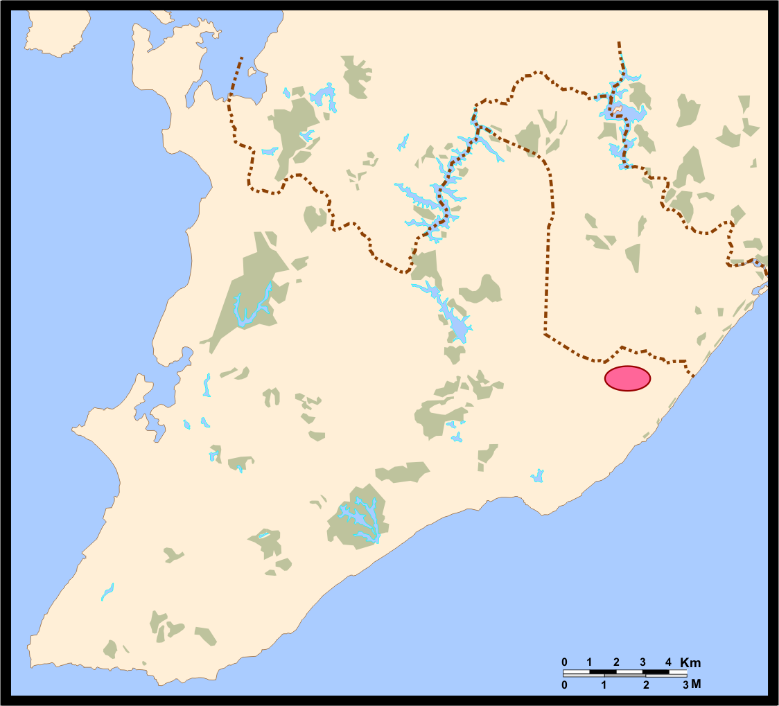 Mapa de Salvador (Bahia, Brazil) - Localização do Aeroporto Internacional de Salvador.